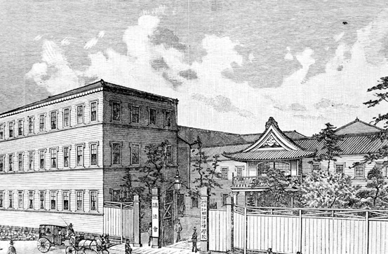 明治法律学校南甲賀町校舎